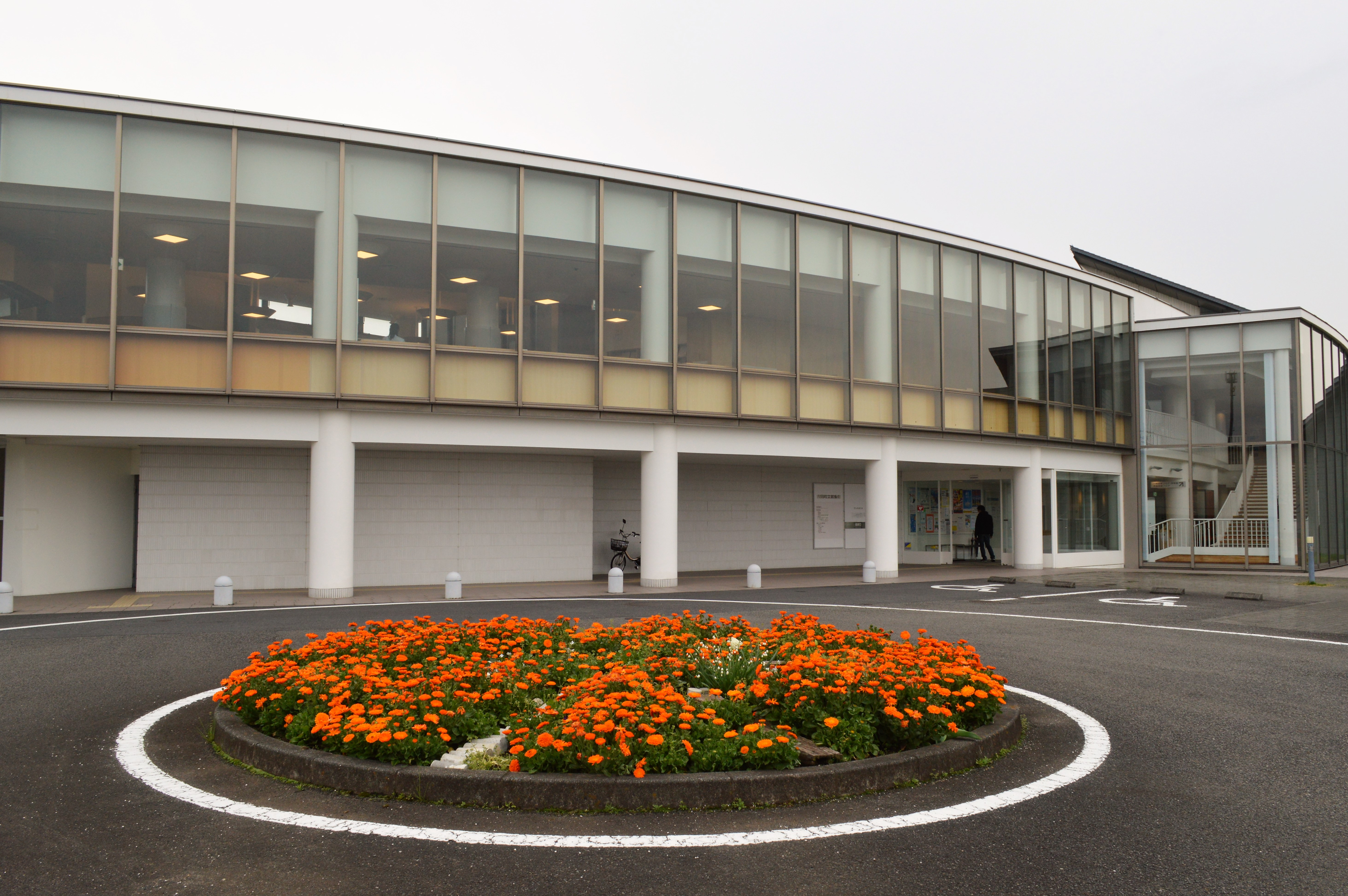 静岡県榛原郡の吉田町立図書館。